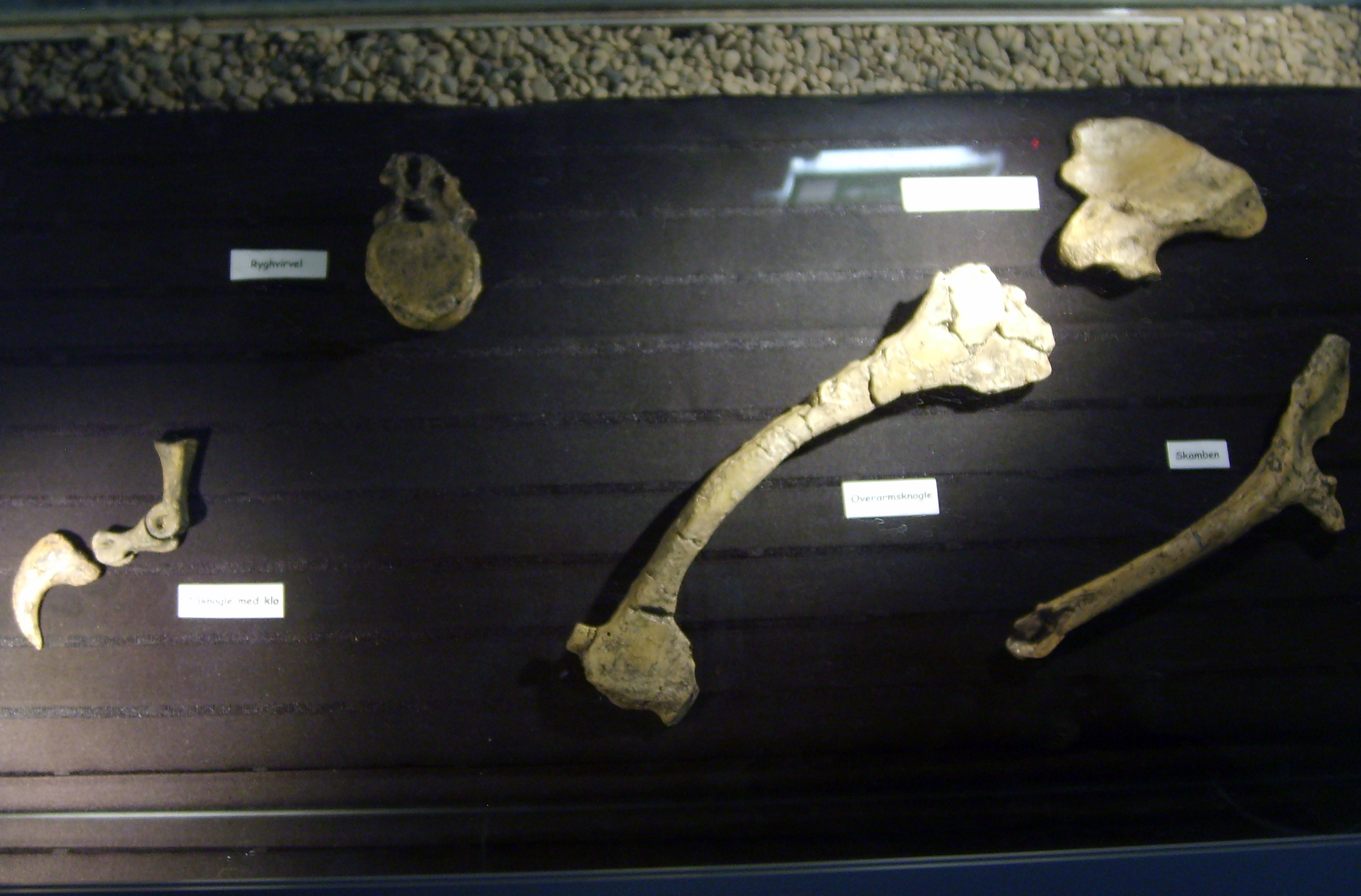 Unenlagia paynemili fossil casts, Copenhagen